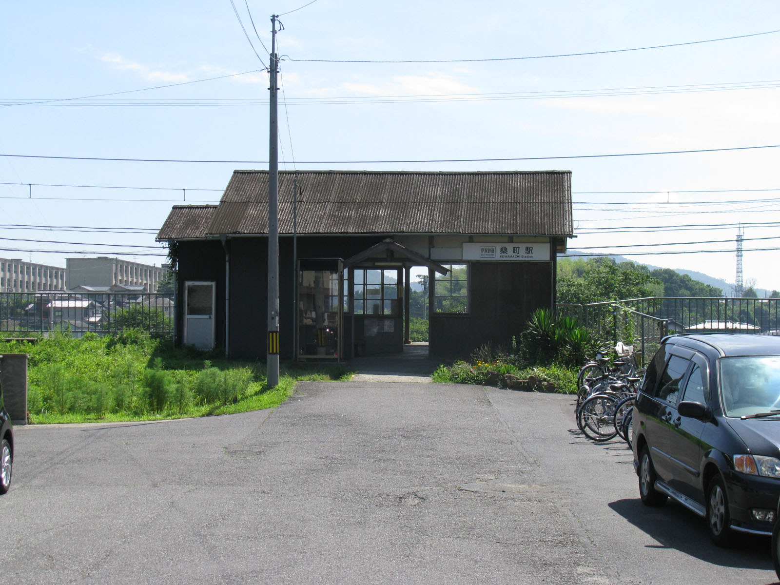 伊賀鉄道桑町駅